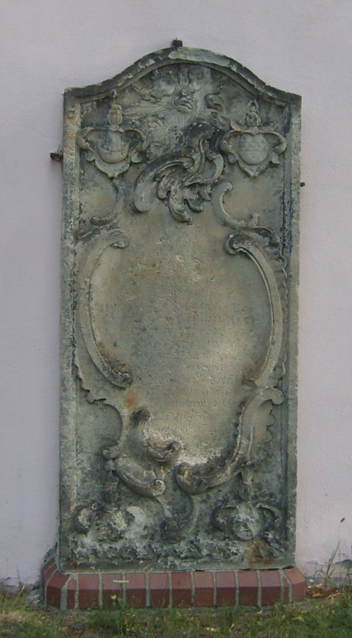 Dorfkirche in Döllingen Grabstein des Otto von Dallwitz